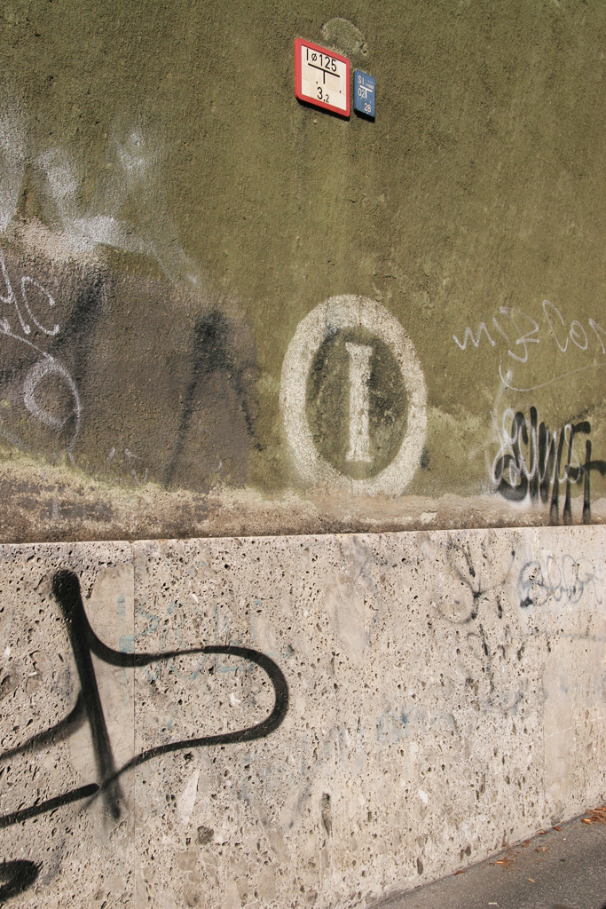 via Bonardi 45°28'45.95"N 9°13'47.33"E Indicazione muraria di idrante